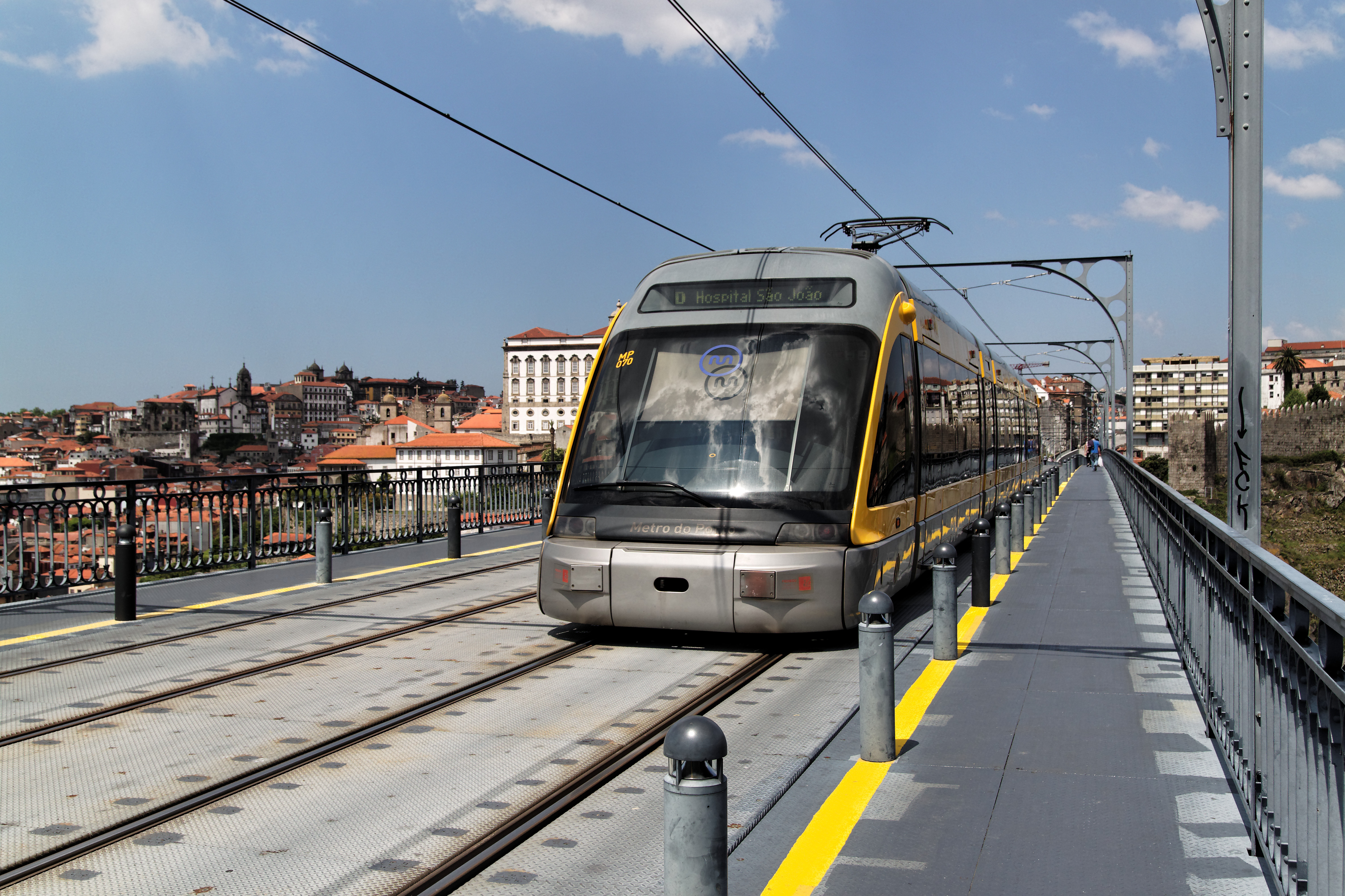 Tren del Metro de Porto Cruzando el puente de Luis I. Portugal.